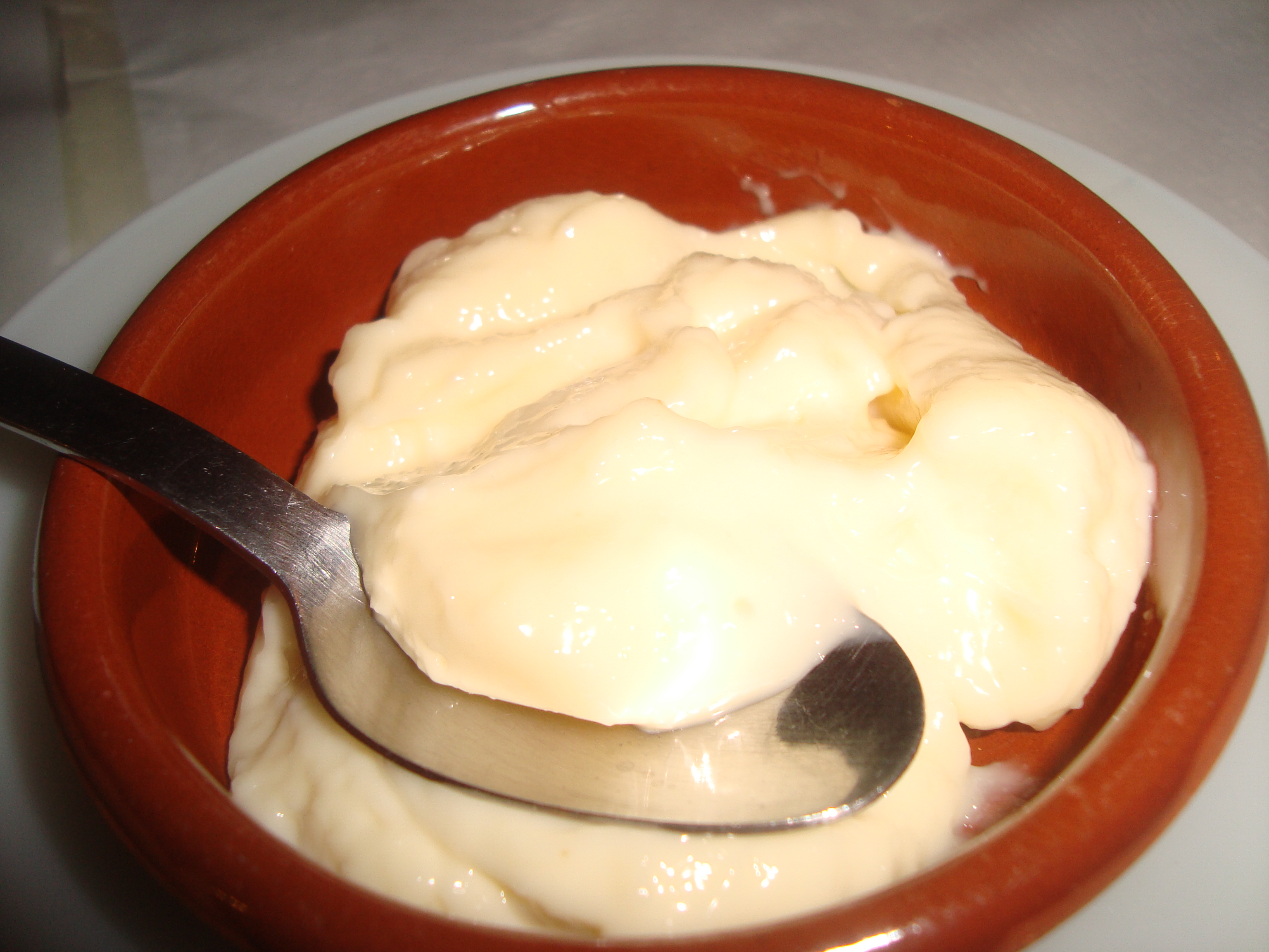 Ajoaceite